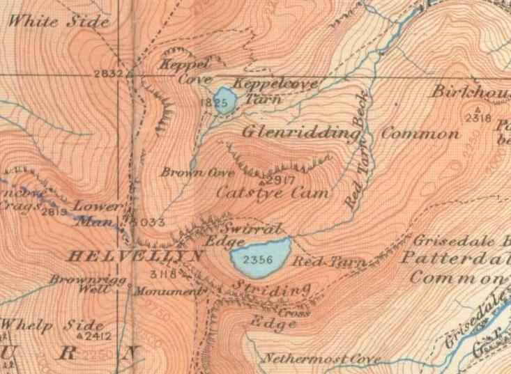 old OS map